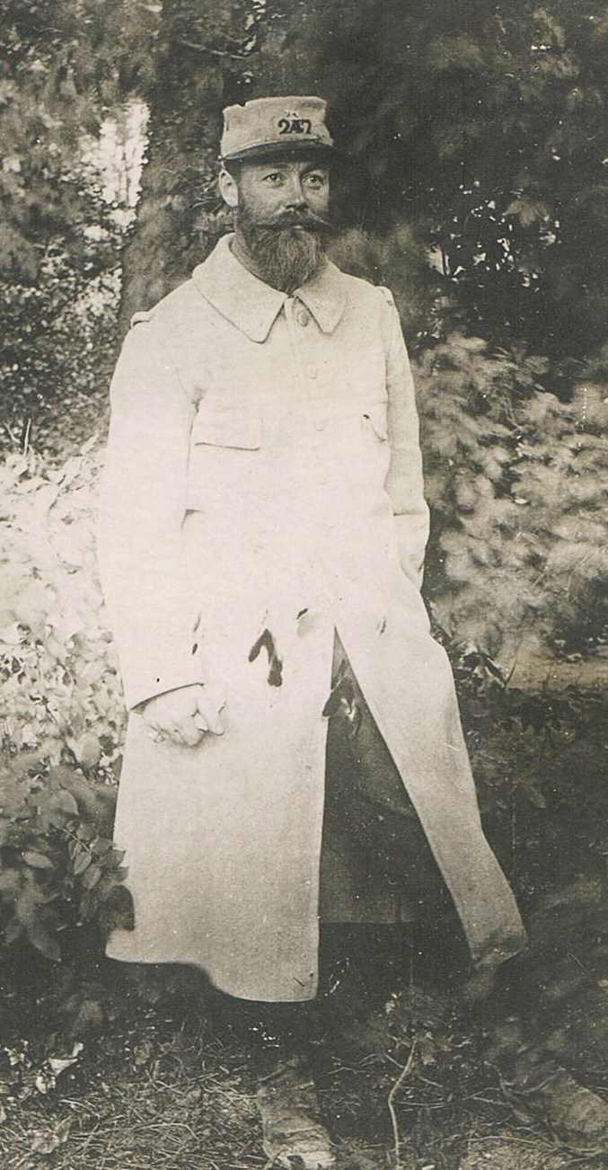 L'architecte Alexandre Miniac (1887-1963) en uniforme du 247ème régiment d'infanterie, vers 1918.